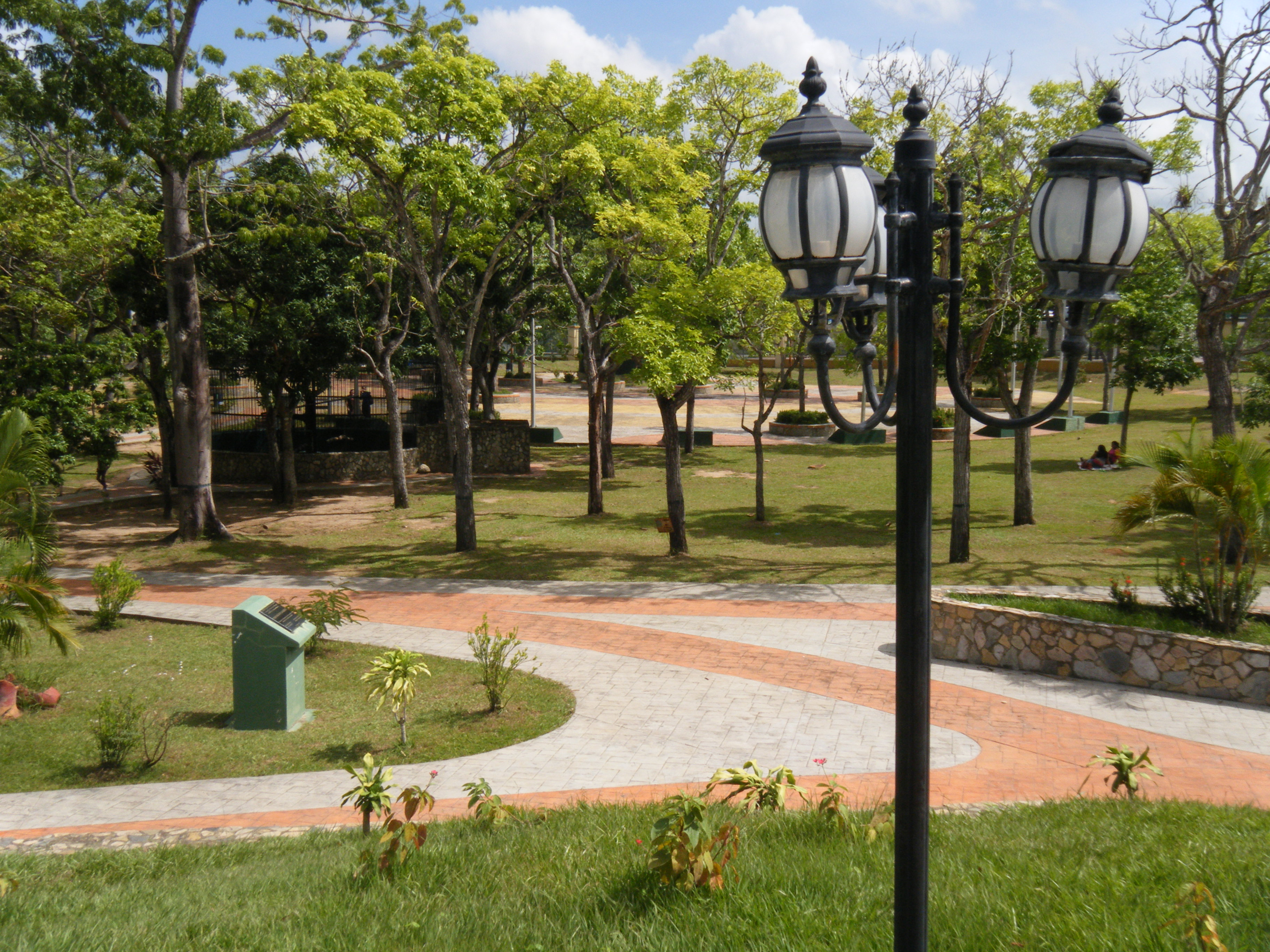 Vista del Parque La Guaricha desde la montañita.